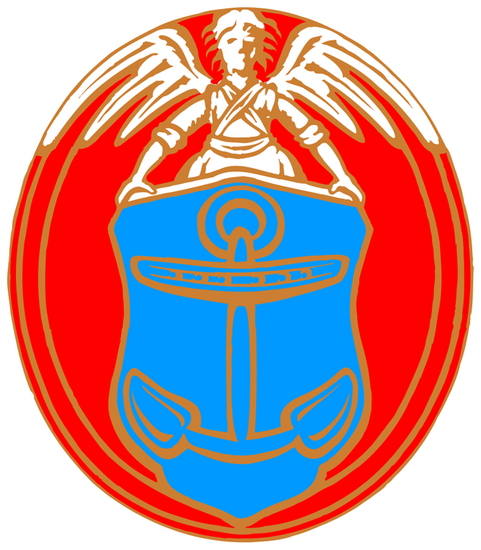 Shield of Dragør Municipality (2007)